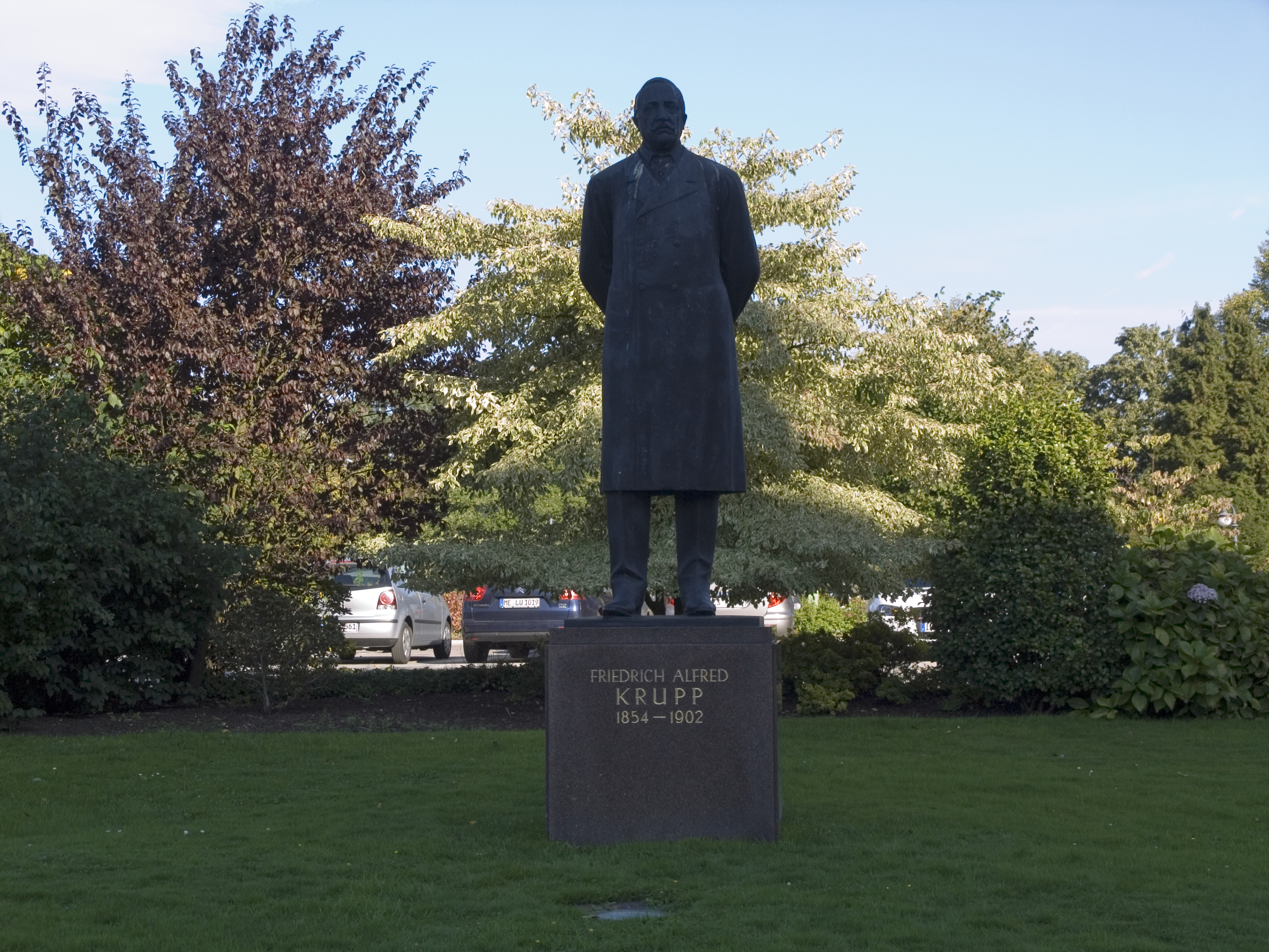 Denkmal für Friedrich Alfred Krupp von Hugo Lederer, vor dem heutigen Krupp-Museum (Teil der Villa Hügel, Essen)